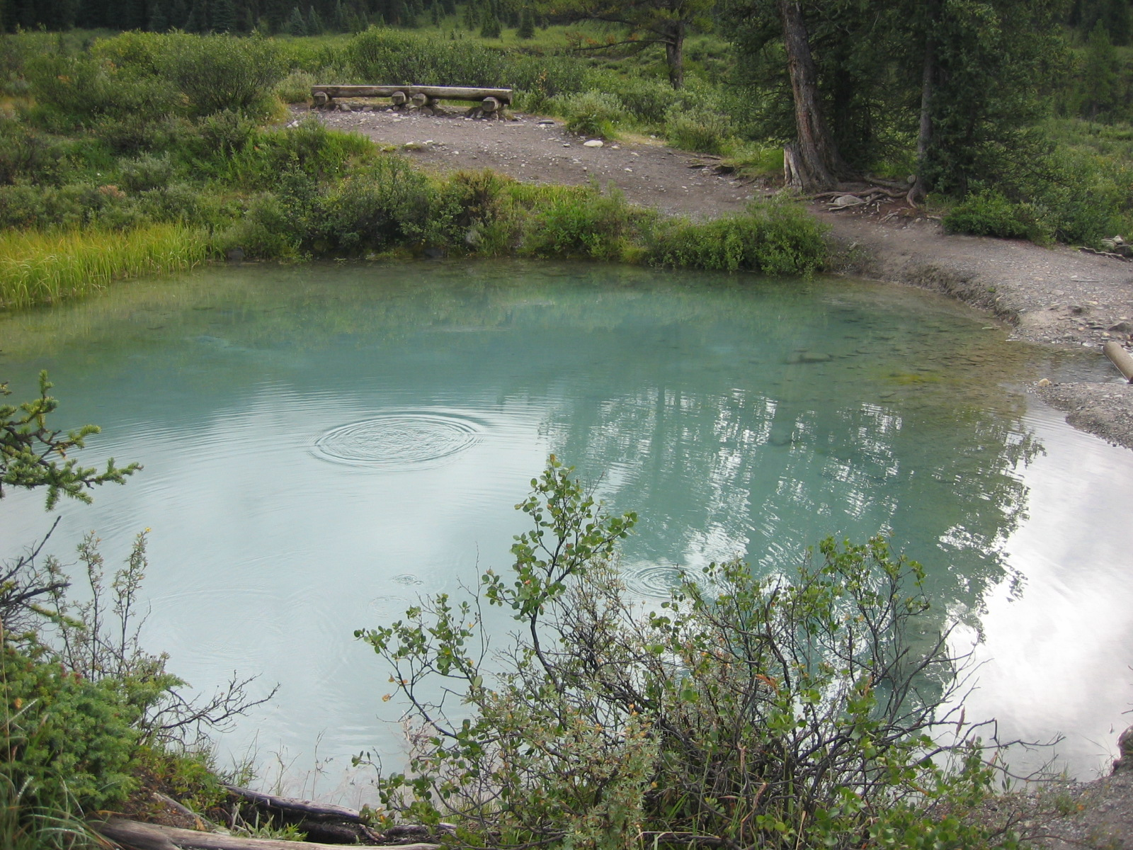 Ink Pots, Banff National Park, Alberta